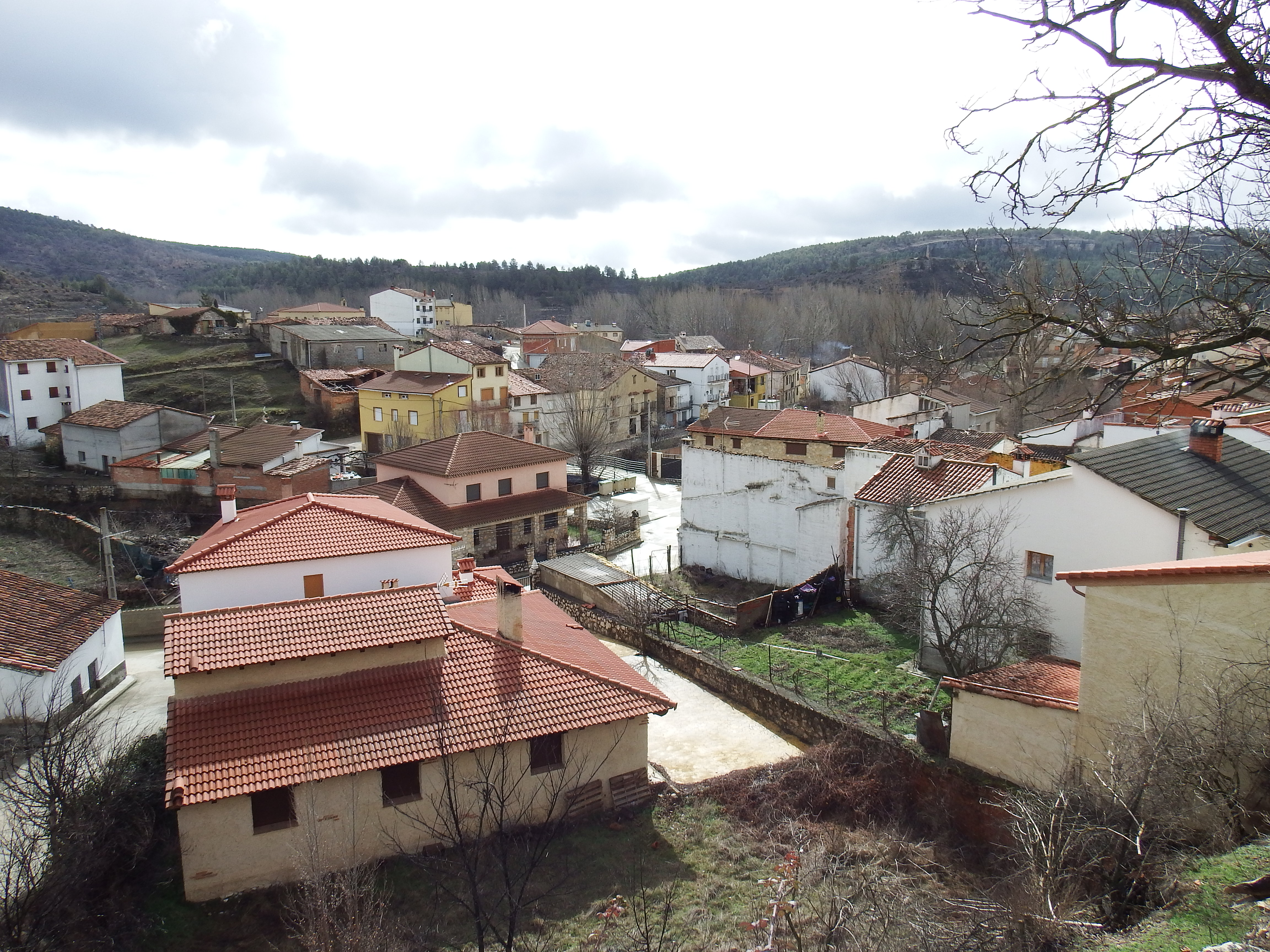 Vista general del pueblo